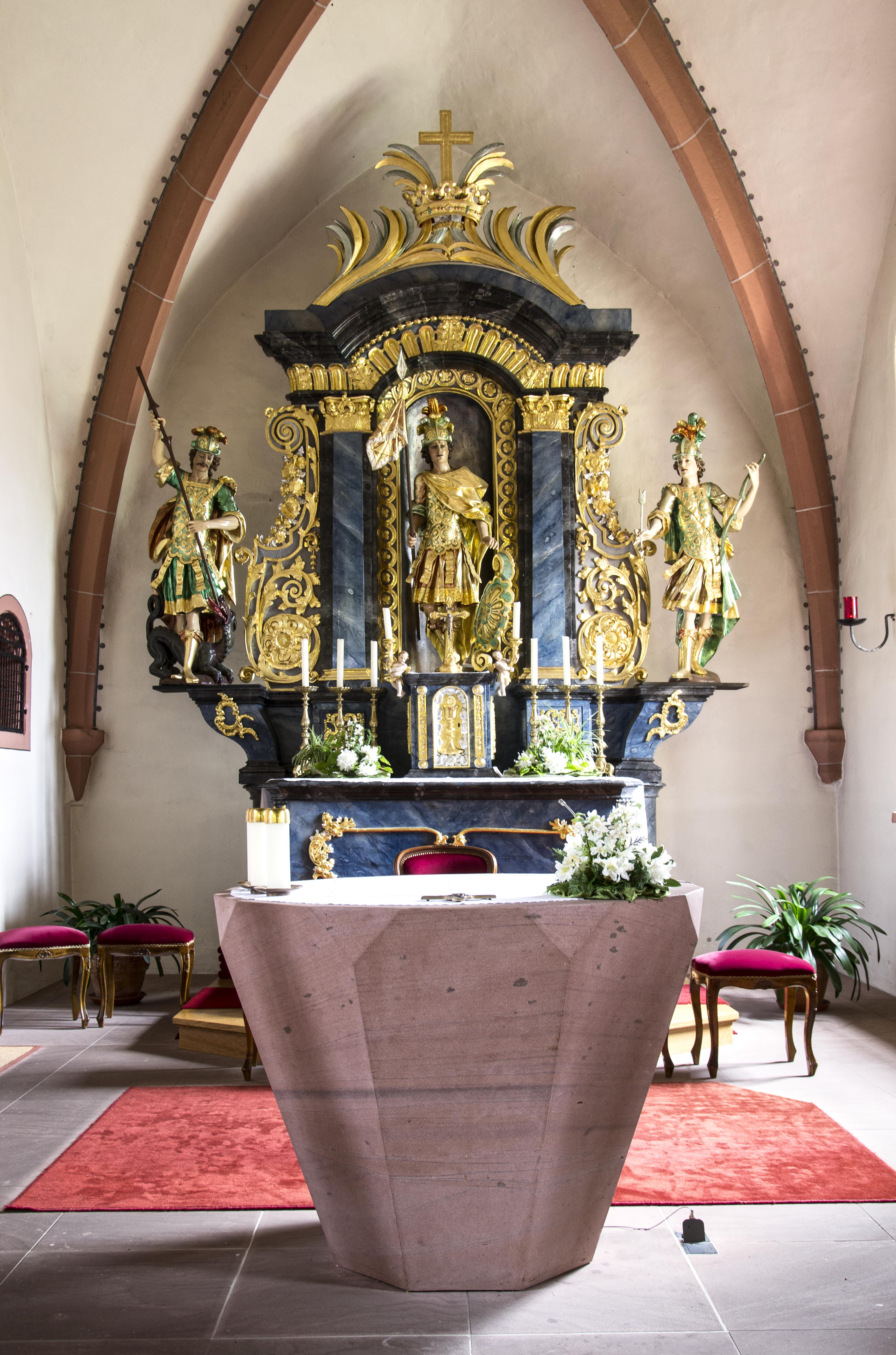 Bilder von der Pfarrkirche St. Mauritius in Prinzbach bei Biberach